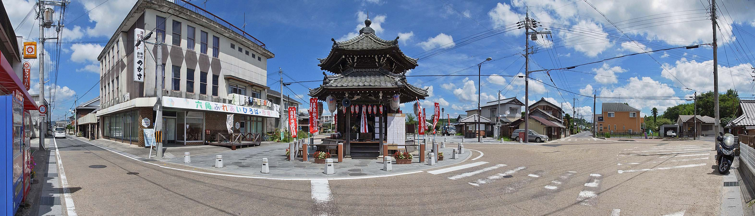 Rokkaku dou , 六角堂